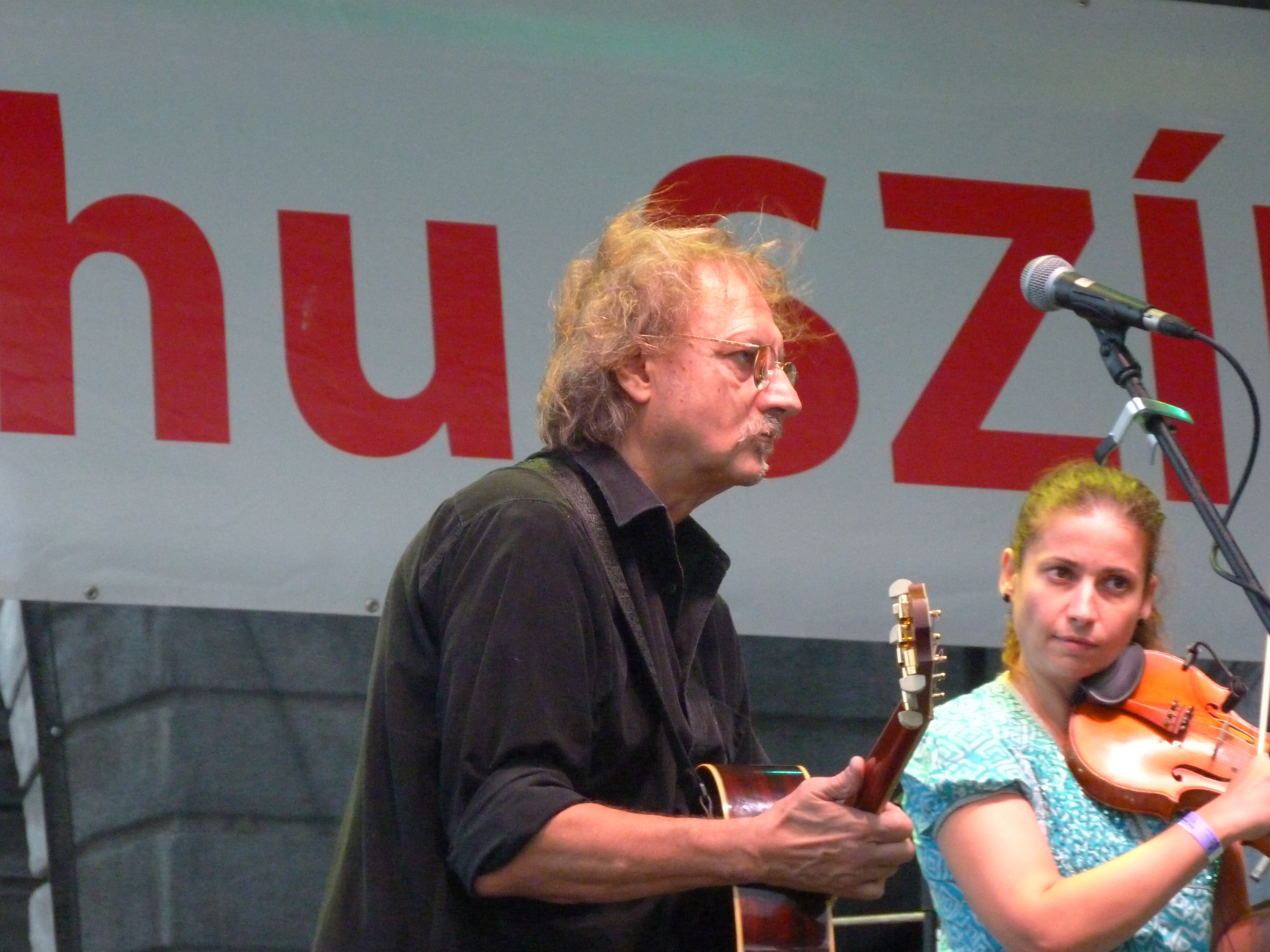 A felvétel 2014. szeptember 12-én, pénteken készült Budapesten, a 23. Budavári Borfesztiválon. Nagyszínpad, a Makám együttes és vendégei. Az együttes tagjai: Krulik Zoltán - gitár Korzenszky Klára - ének Kuczera Barbara – hegedű, vokál Boros Attila - basszusgitár Eredics Dávid - fúvós hangszerek Keönch László - ütőhangszerek Mohai György - hangmérnök ( Szalóki Ágnes, Lovász Irén. Bognár Szilvia: Katona sirató KATONA SIRATÓ MAKÁM BOGNÁR SZILVIA MIHI 2014 Források Bor és Pia borpiaci szakmai magazin 2014. augusztus Borfesztivál Melléklet 23. Budavári Borfesztivál kiállítási tájékoztató ©© Derzsi Elekes Andor, Budapest, 2014, A kép és filmfelvételek egészben, vagy részletekben másolását, bármilyen úton történő sokszorosítását és felhasználását a szerző ellenérték nélkül, jogutódjaira is kihatóan megengedi. Az engedély kiterjed a kereskedelmi célú hasznosításra is. Kéri azonban nevének feltüntetését a felhasználás során. A Metapolisz sorozat valamennyi képe és filmje Creative Commons alatti valamint kereskedelmi - for profit - célra is felhasználható. Ajánlott hivatkozás: Derzsi Elekes Andor: Metapolisz DVD line